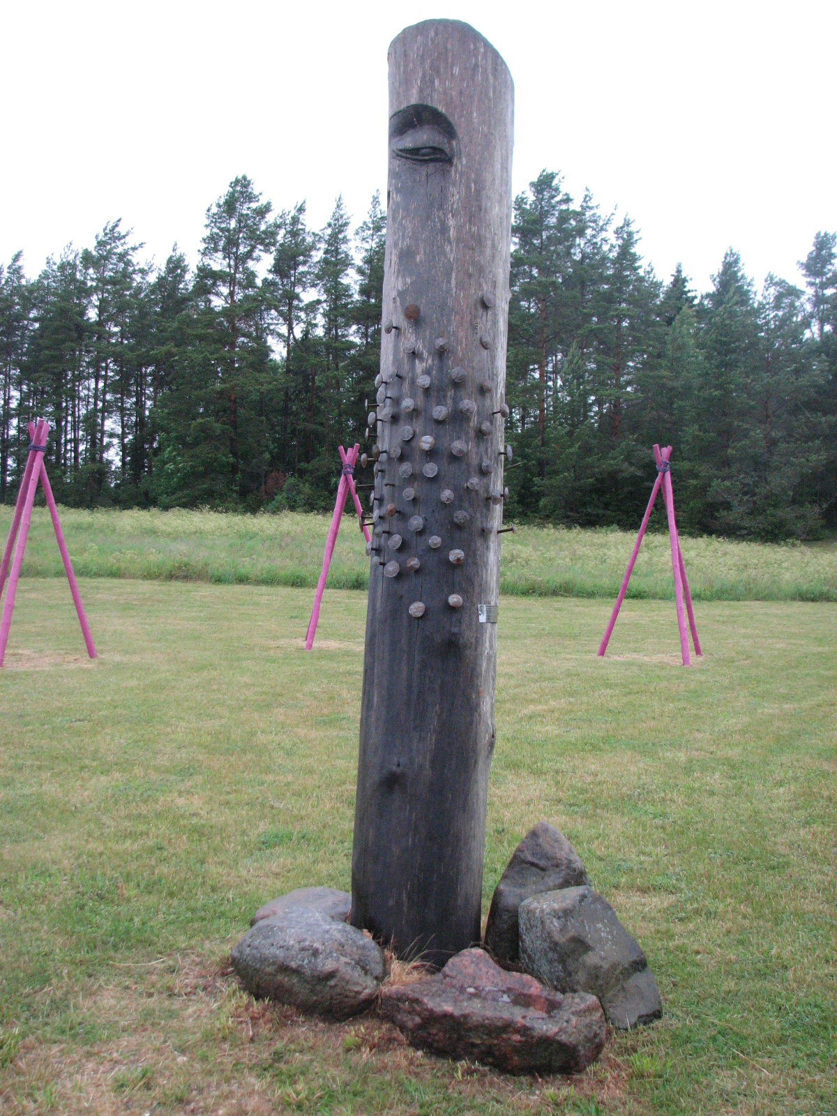 Tubala boulder, Estonia